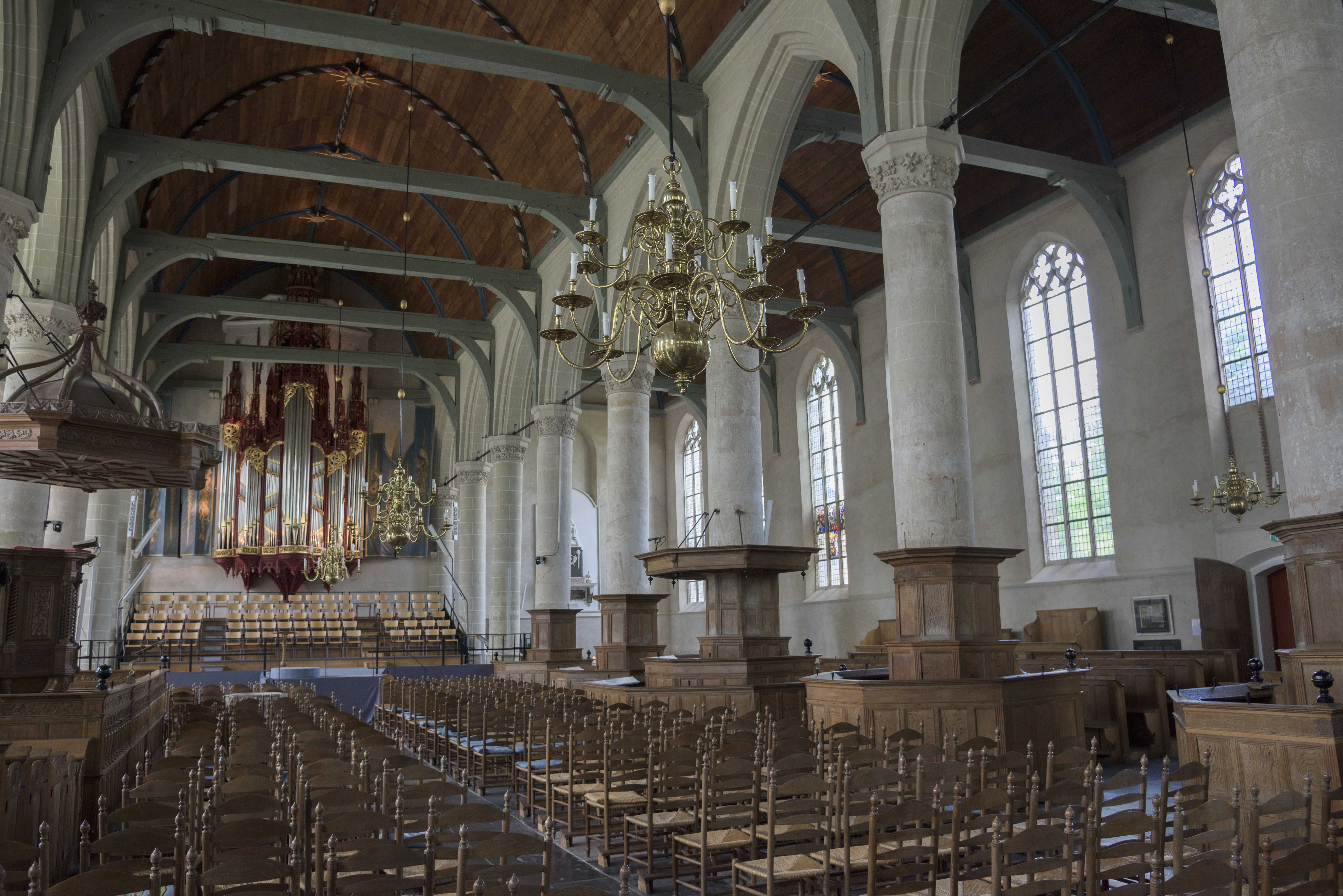 Interieur van de Grote of Sint-Nicolaaskerk, Monnickendam